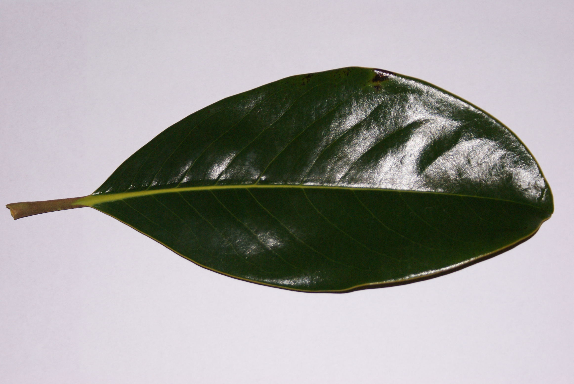 Foglia di Magnolia grandiflora